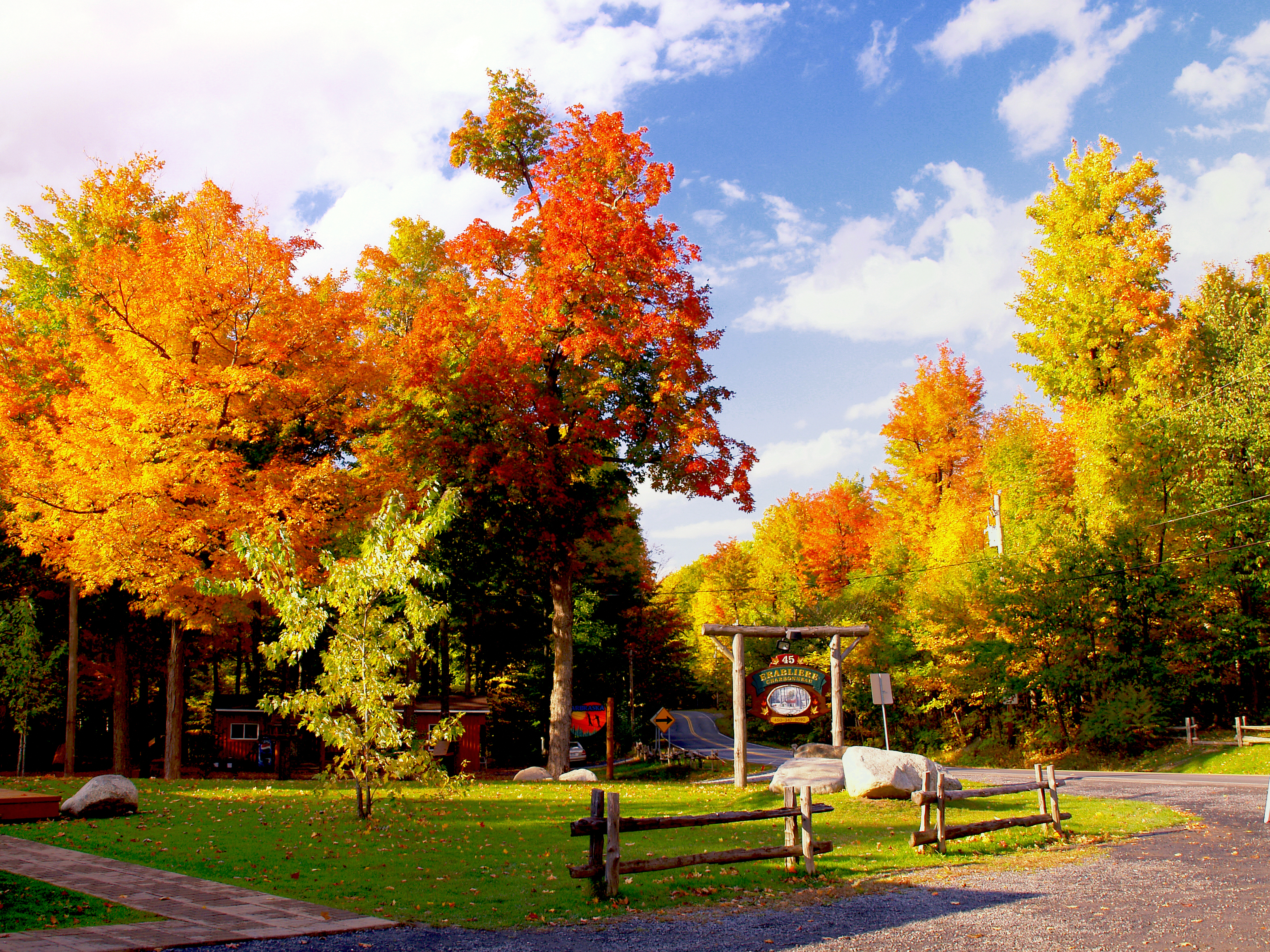 Mont-Saint-Gregoire - Chemin du Sous-bois, érablière Denis Charbonneau